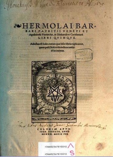 Hermolaus_Barbarus_Corollarii_1530 ed. title page